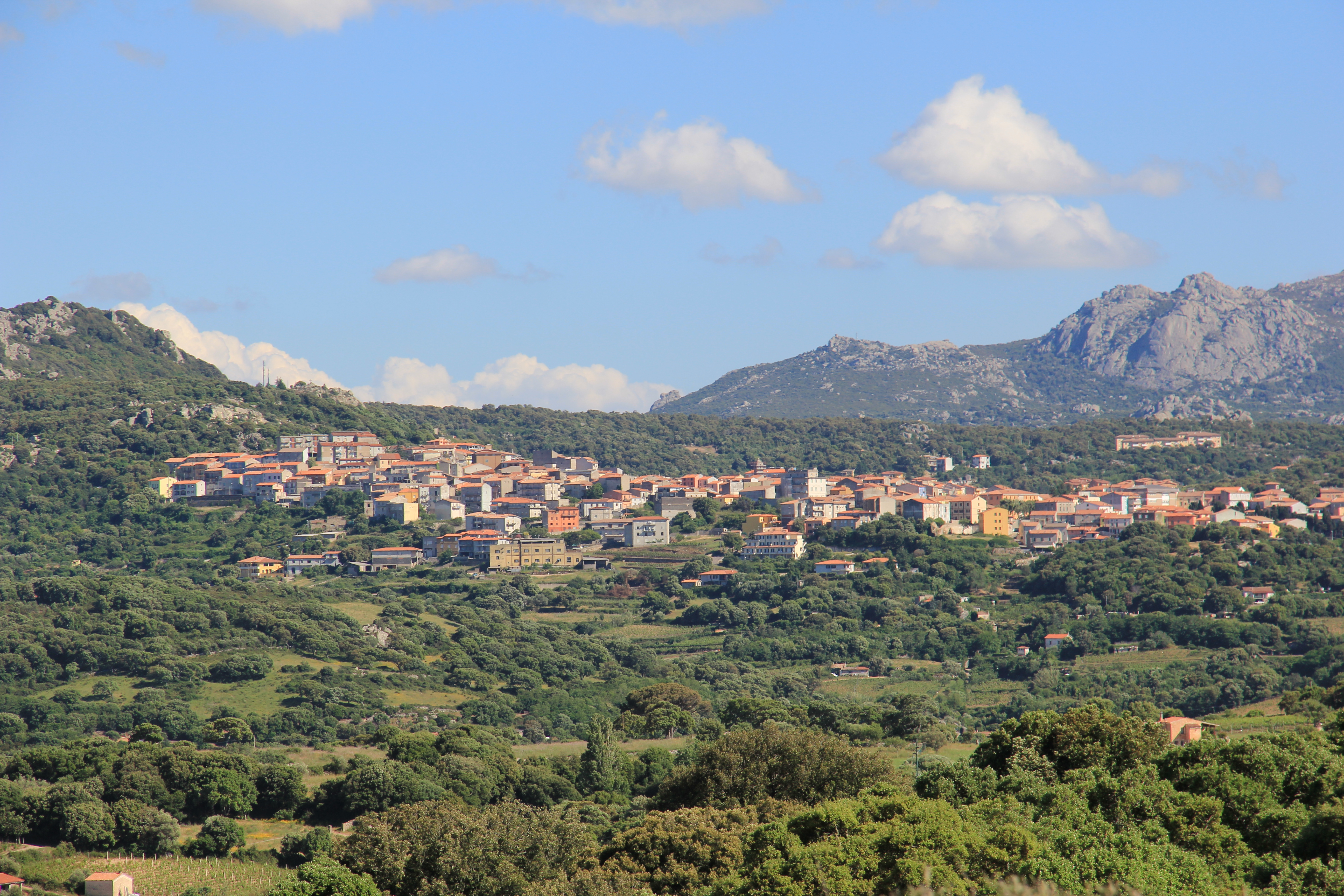 Panorama